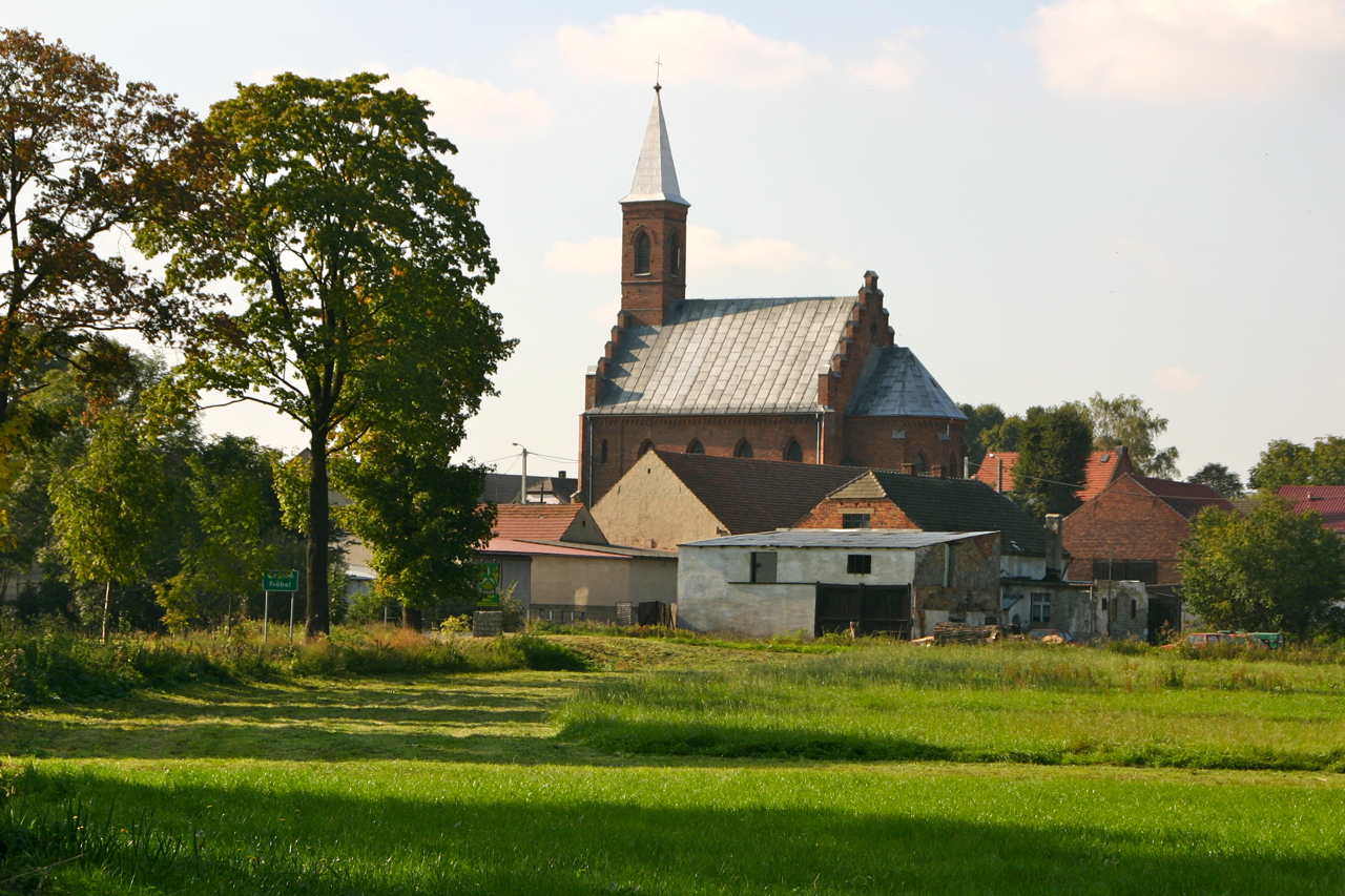 Wróblin - rzymskokatolicki kościół parafialny pw. św. Michała Archanioła, 1855.